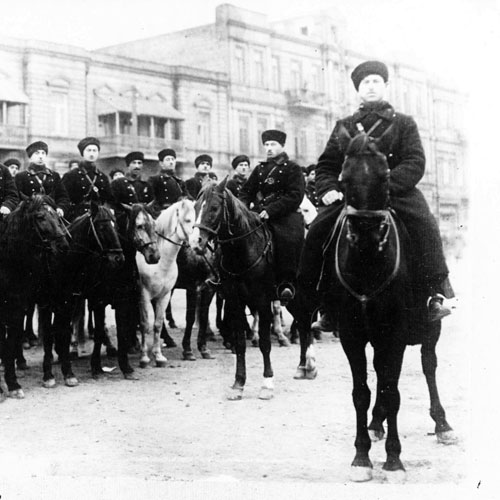 Бакинская милиция.